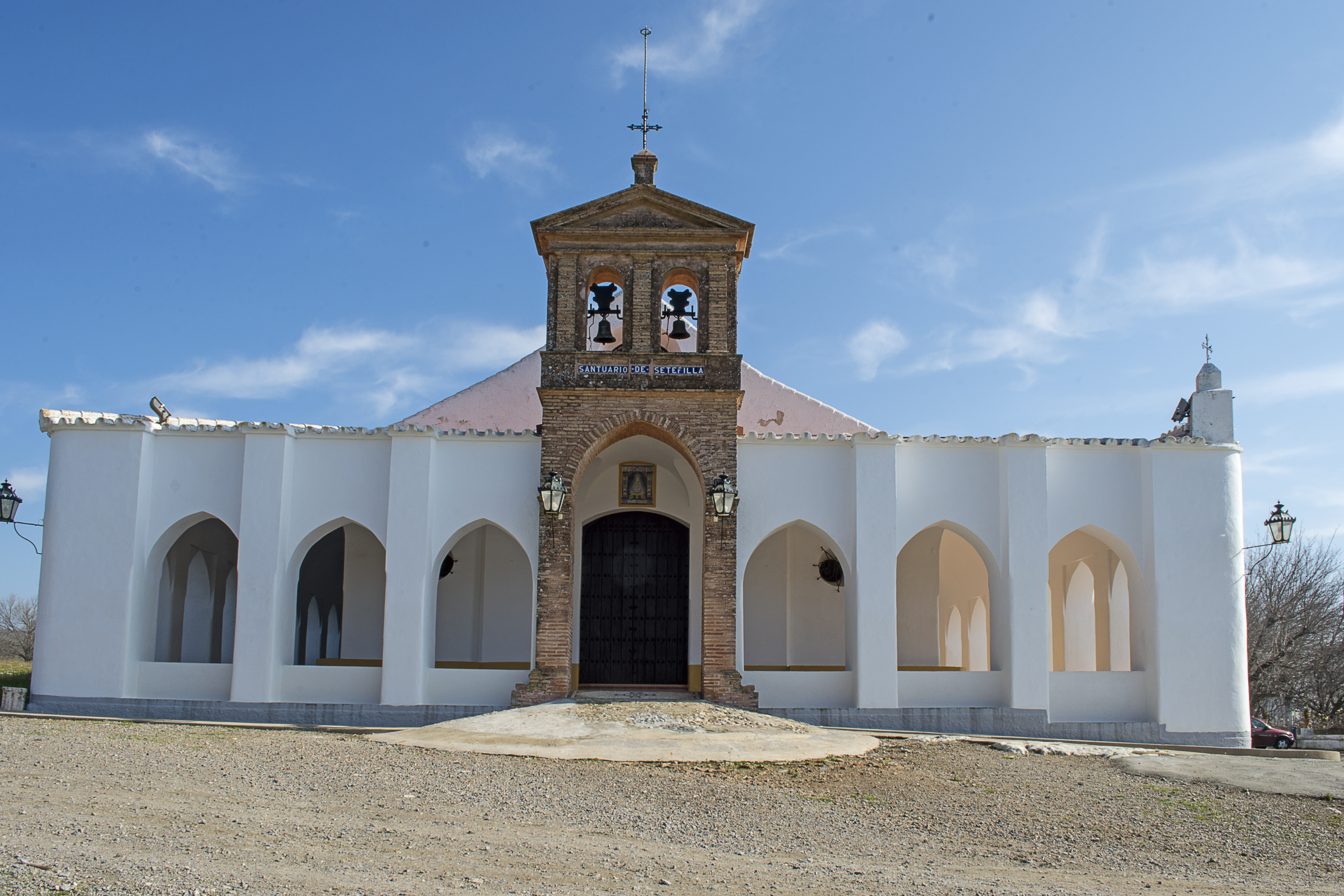 Exterior de la ermita de Setefilla